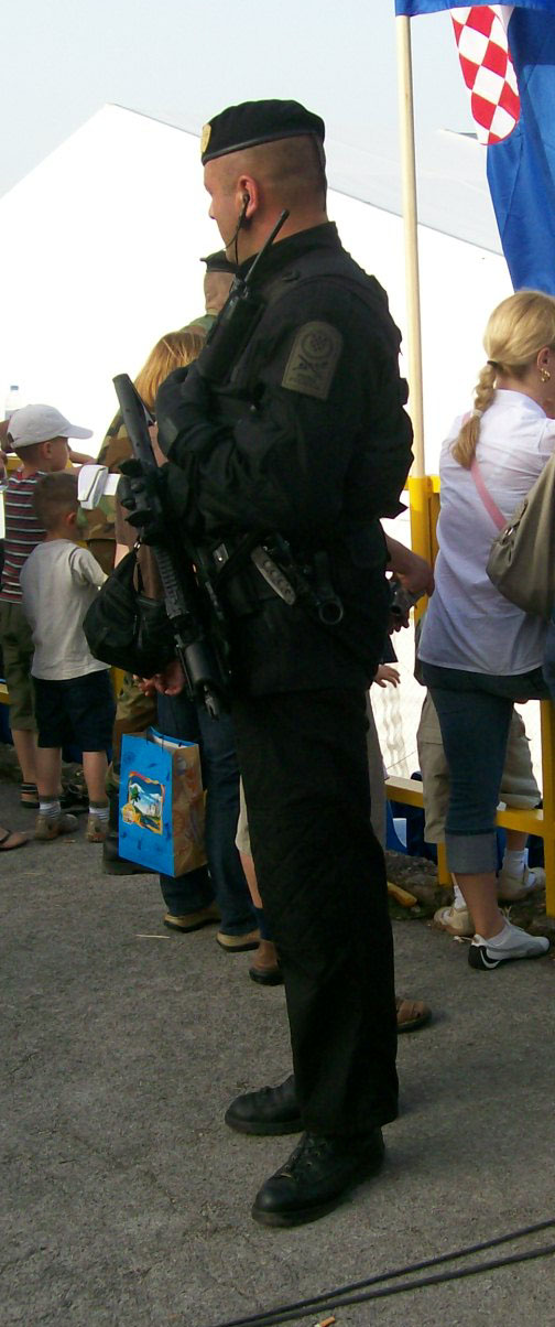 Pripadnik Antiterorističke Vojne policije Hrvatske vojske